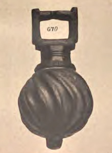 Кистень из Таганчи.